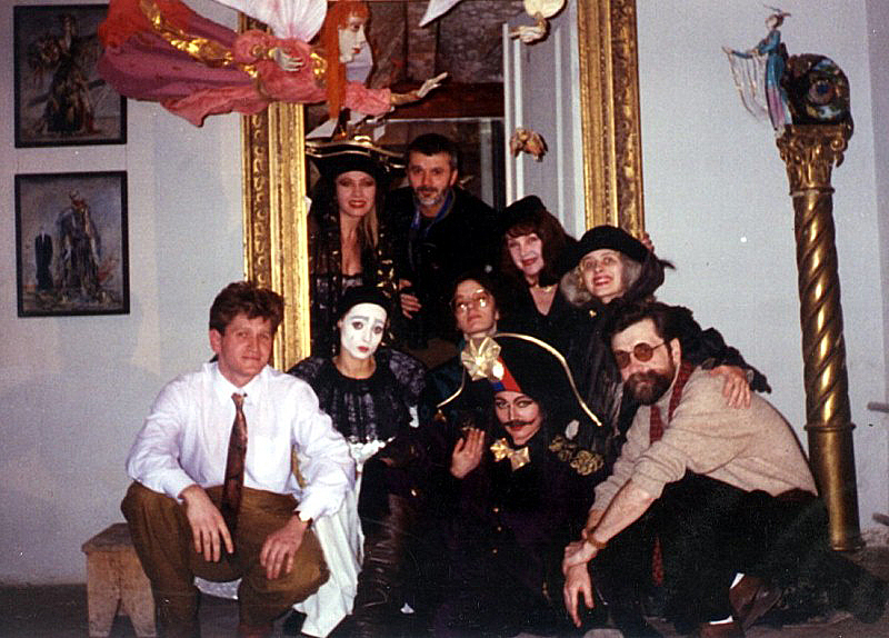 Карась Галерея 1995 март